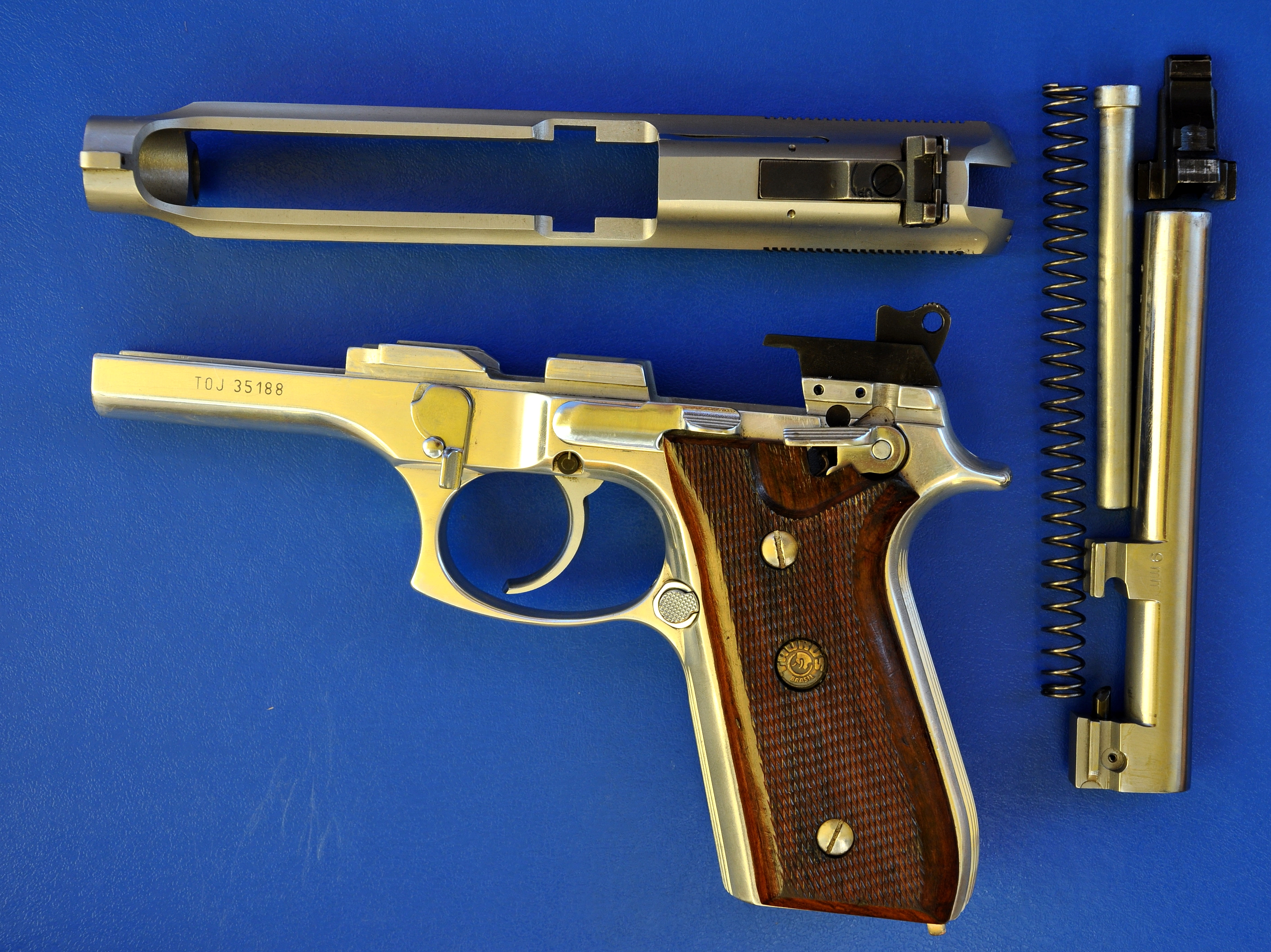 Taurus PT99ASF rozłożony